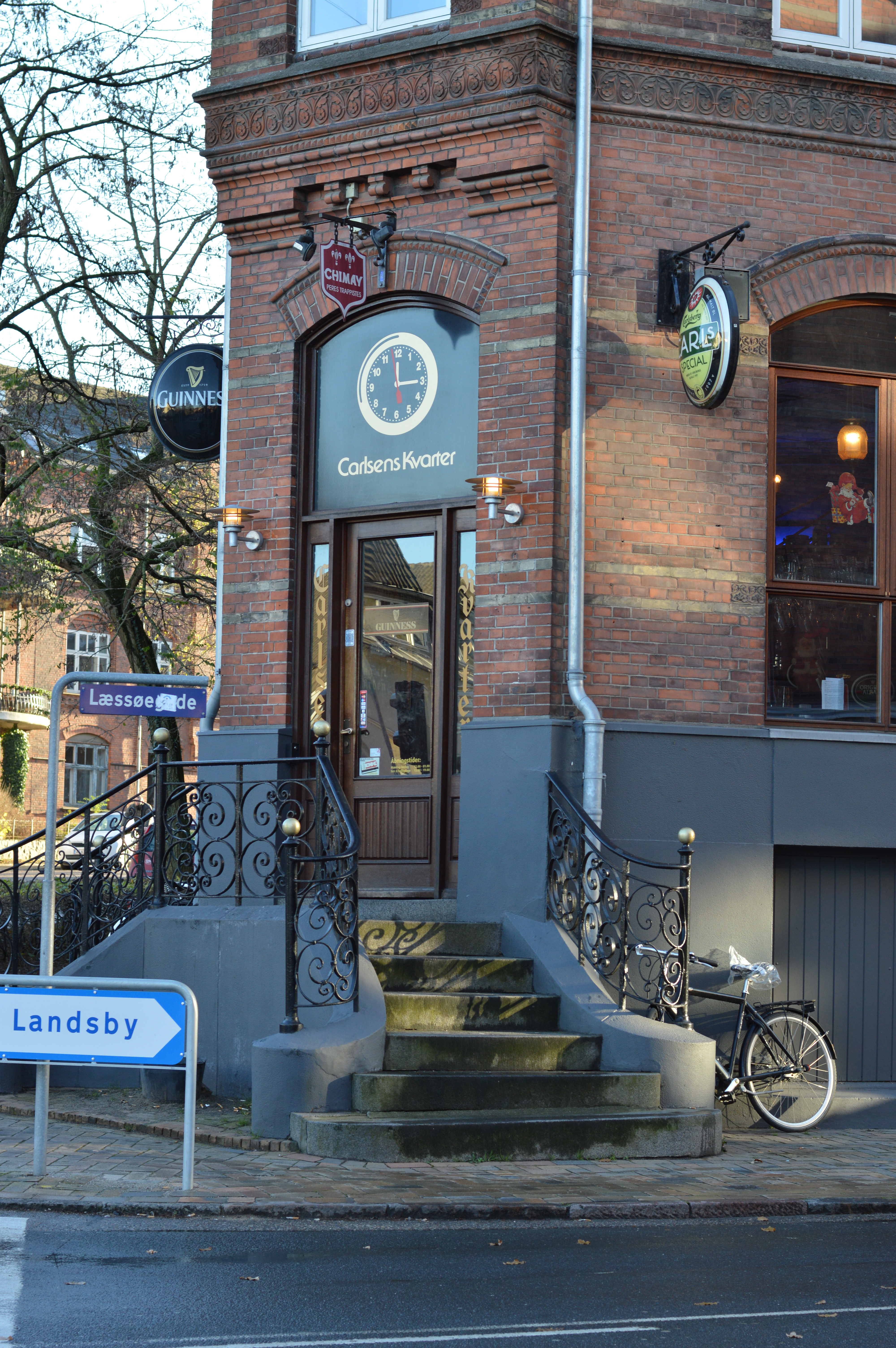 Carlsens Kvarter i Odense